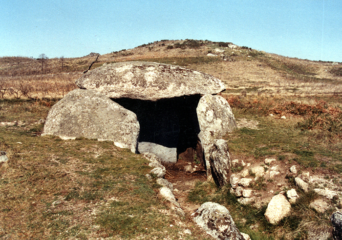 Anta da Aboboreira - dolmen - Baião Portugal 1982